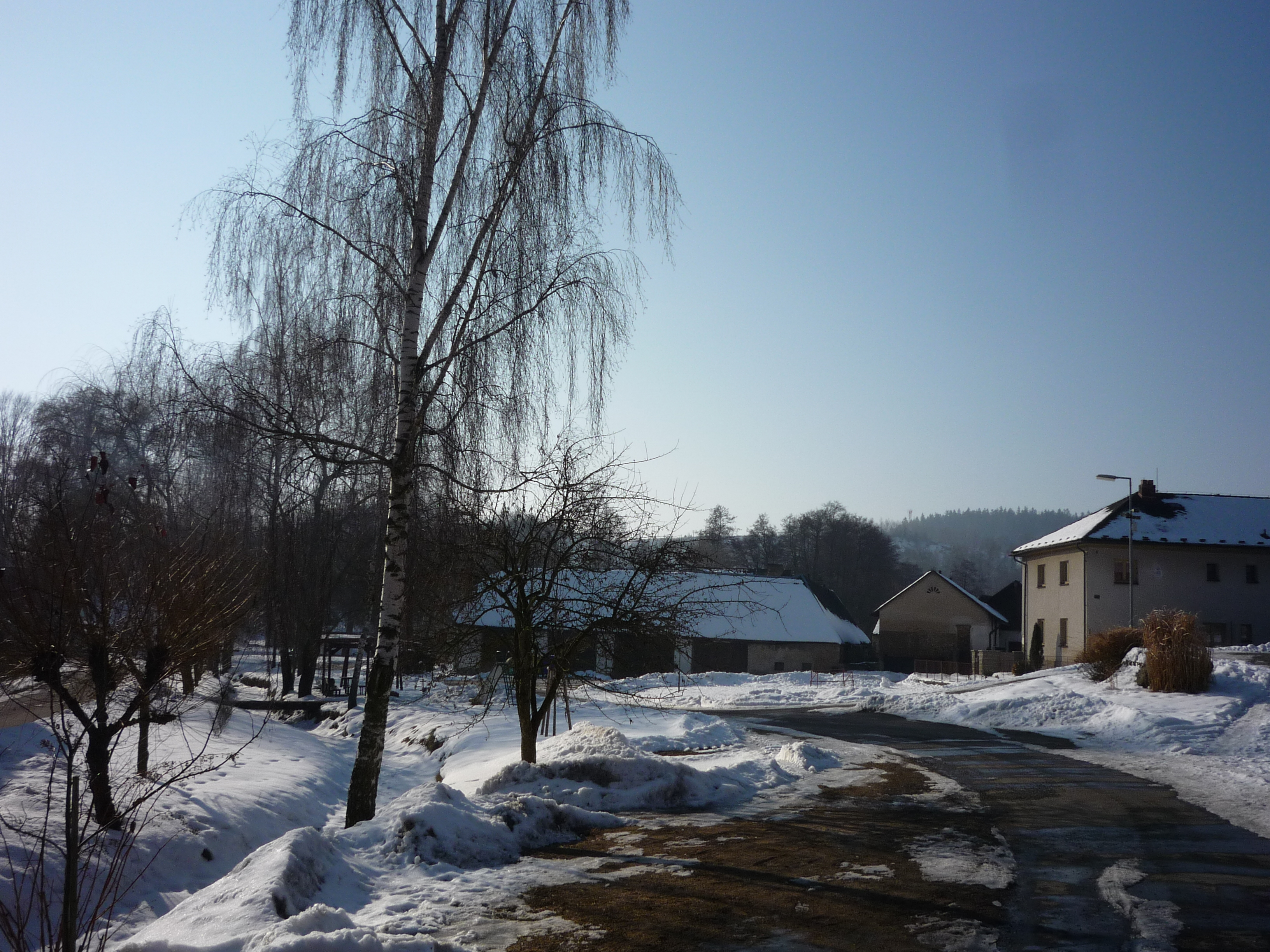 Autor fotografie Jiří Zelenka. Osada Simtany. Obec Pohled. Okr. Havlíčkův Brod. Kraj Vysočina. Czech Republic.